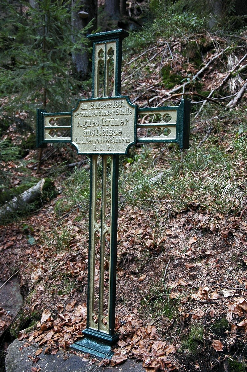 Gedenkkreuz in der Steinklamm. Text: "Am 12. März 1881 ertrank an dieser Stelle Agnes Grüner aus Neisse im Alter von 16 ½ Jahren R.J.P."